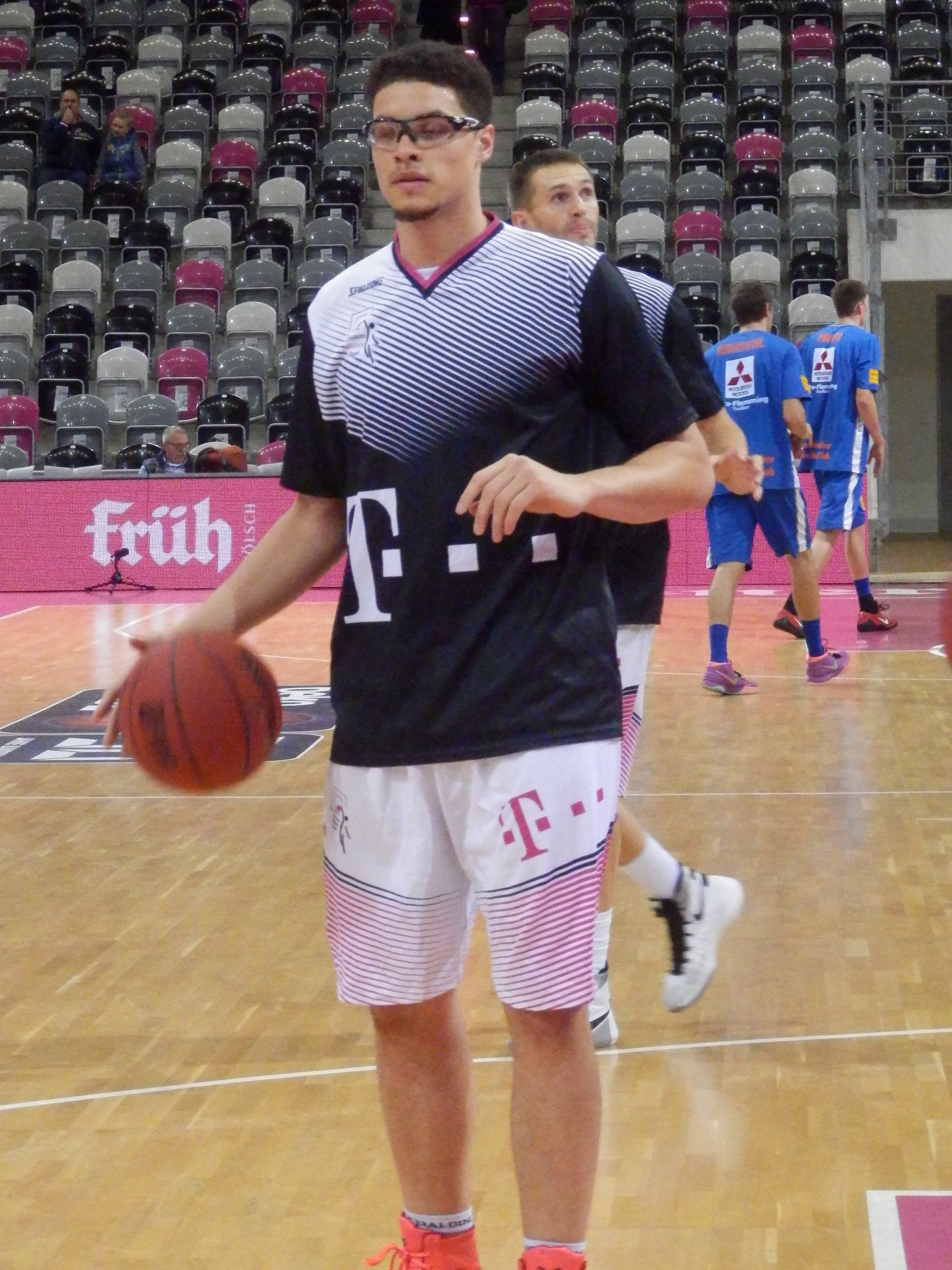 Isaiah Philmore beim Spiel der Telekom Baskets Bonn gegen den MBC am 7. Oktober 2015.